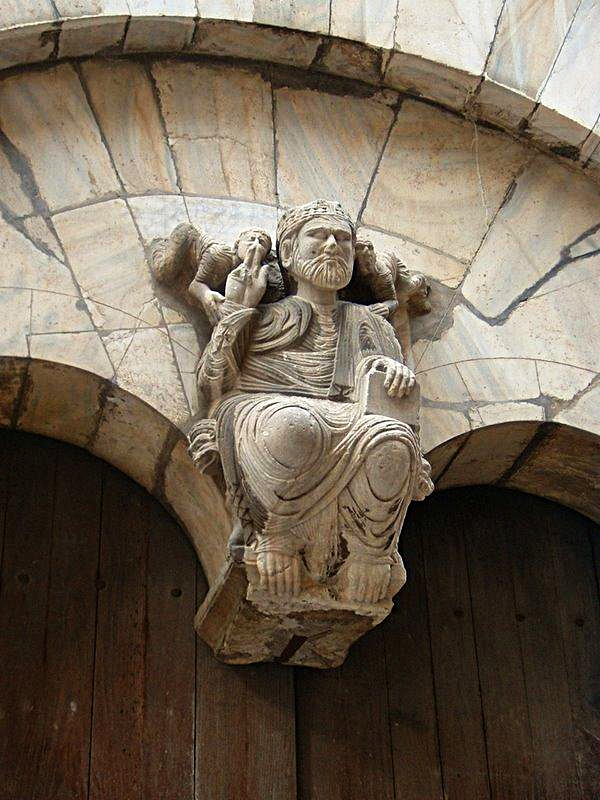 Cathédrale de Perpignan : Christ du portail méridional de Saint Jean le Vieux (XIIIème siècle, attribué à Raymond de Bia)